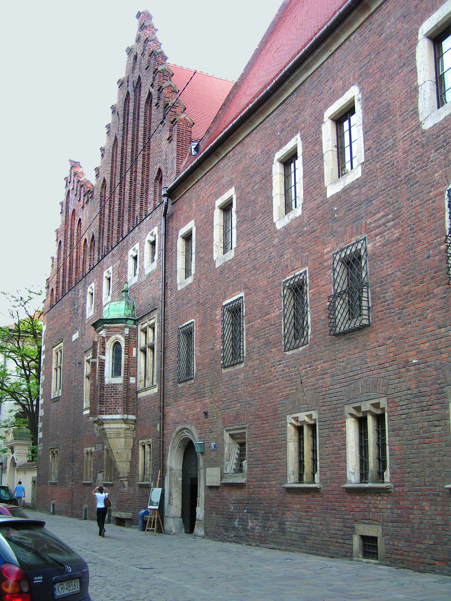 Collegium Maius, Kraków